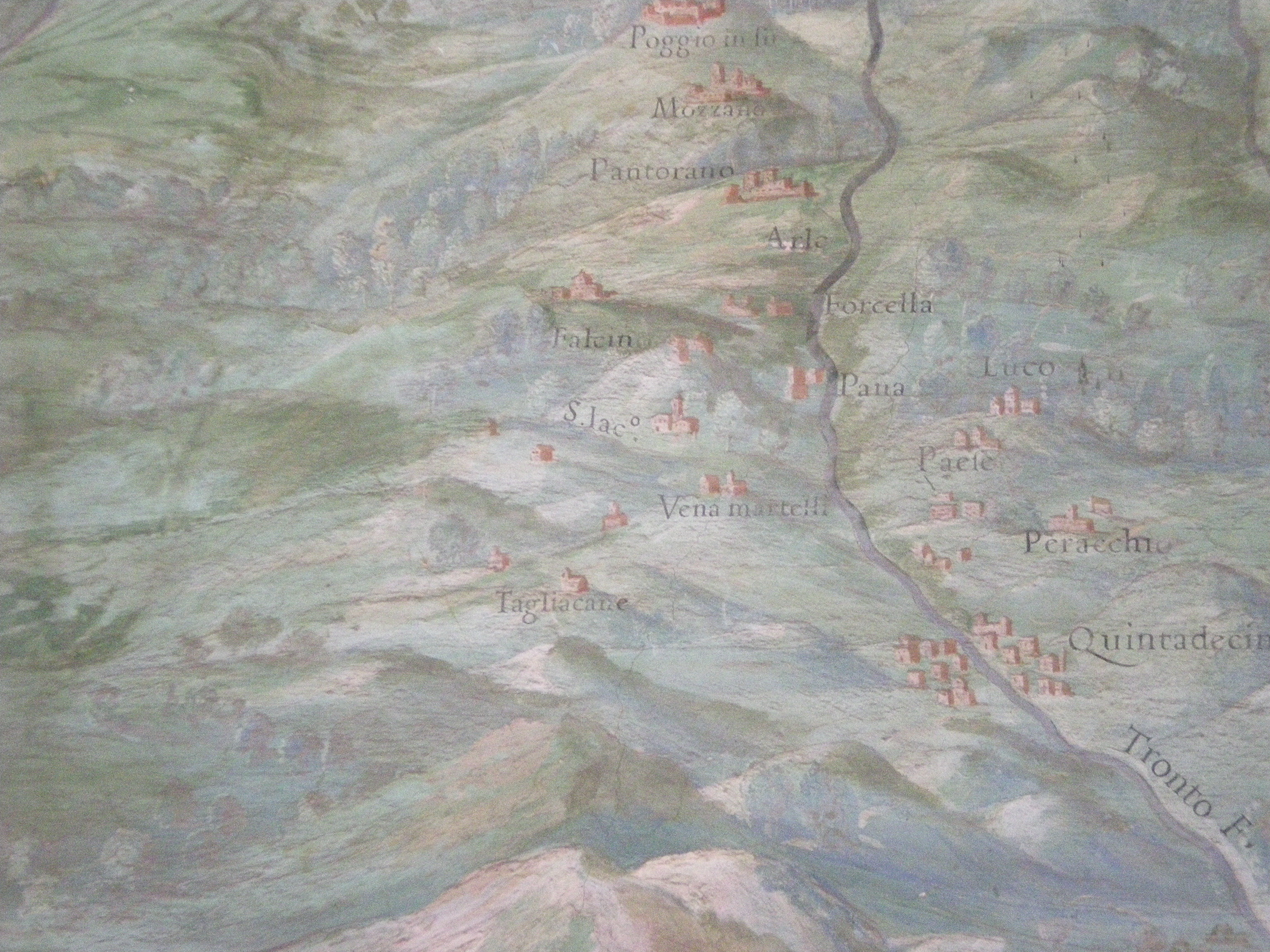 Stefano Mancini Foto della cartina nei Musei Vaticani di Tallacano nel 1527 presente con il nome di Tagliacane